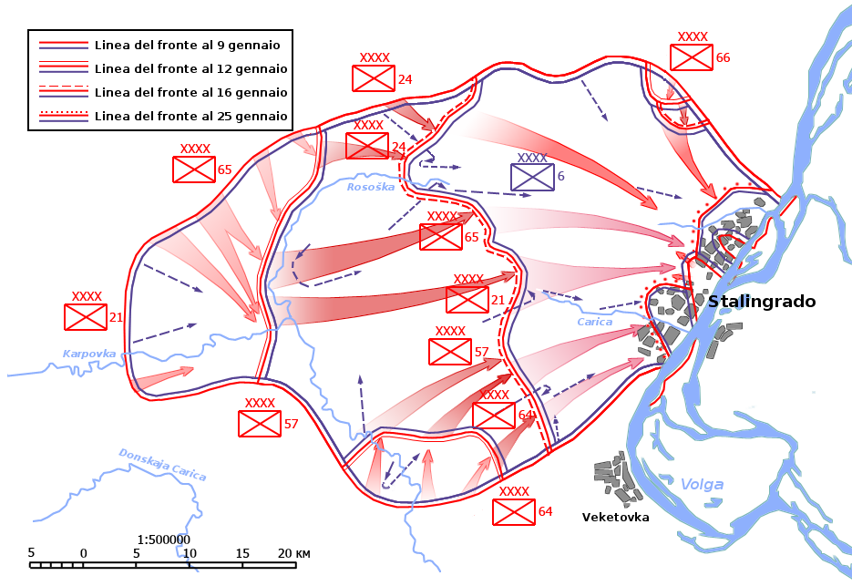 Карта на бойните действия по време на операция Пръстен. Битка за Сталинград.